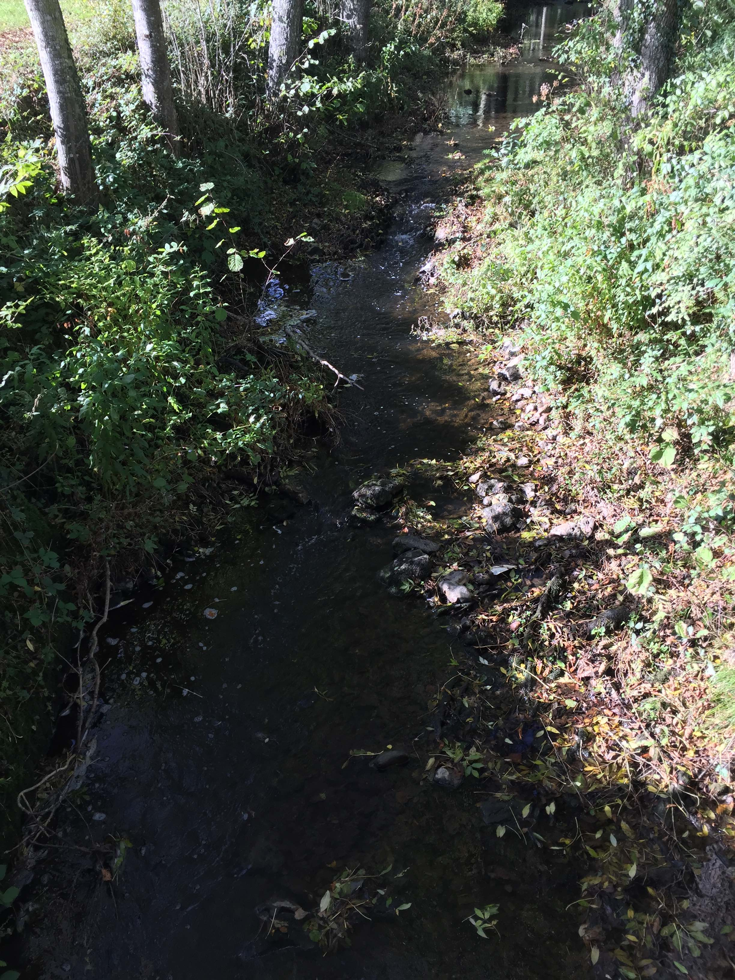 la Foussarde à Frazé en septembre 2017 (très bas niveau), Eure-et-Loir, France.